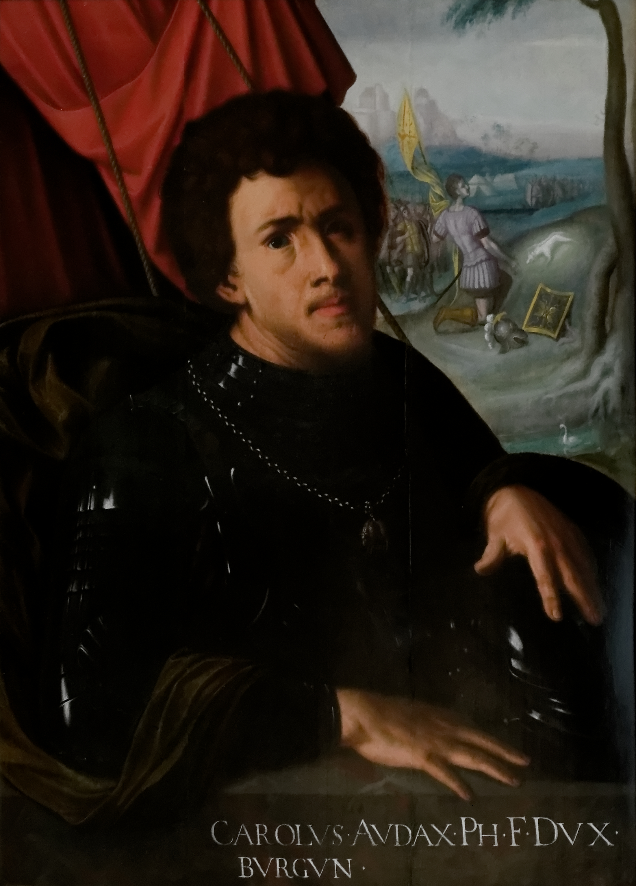 d'après Le portrait composition reprend une composition attribuée à Dosso Dossi représentant un saint guerrier considéré comme saint Guillaume, Maurice ou Georges. L'inscription identifie le personnage comme Charles le Téméraire. Celui-ci porte le collier de la Toison d'Or, auquel fait allusion l'épisode biblique de Gédéon (Livre des juges VI, VI 37-40), figuré au fond du tableau. Gédéon, désireux de s'assurer qu'il a bien été élu pour sauver Israël, propose à Dieu d'étendre à terre une toison qui se mouillera de rosé tandis qu'autour la terre restera sèche, ce qui se produit en effet.